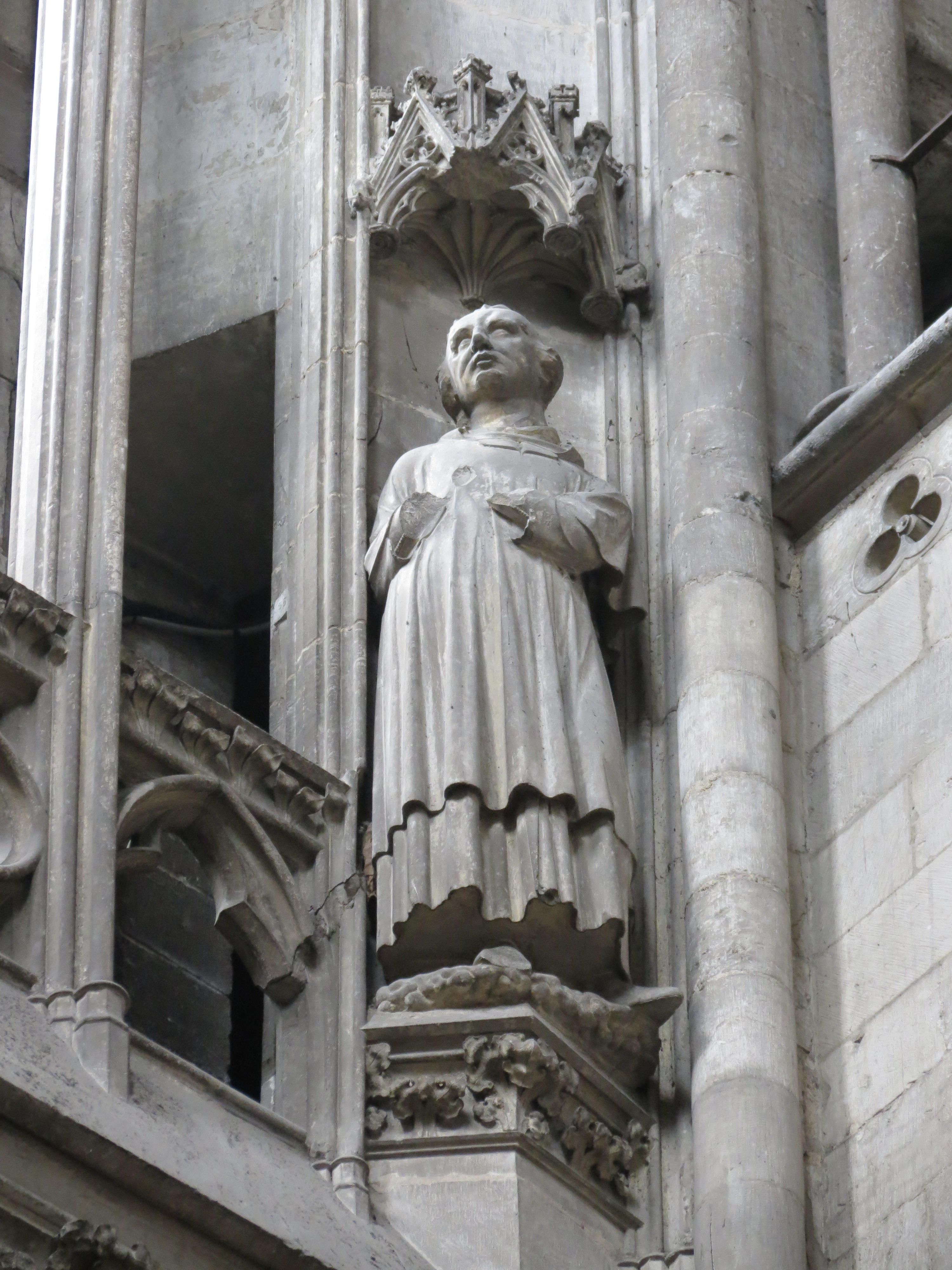 Statue au revers du portail de la Calende, présumée de Jean Gorren, riche bourgeois de Harfleur, qui a financé ce portail.